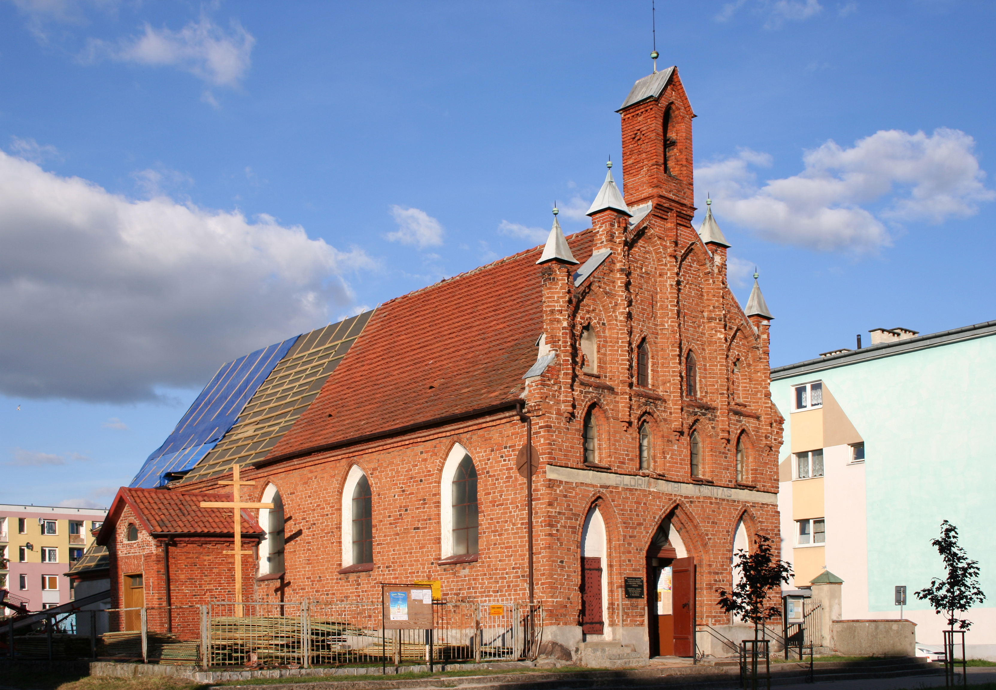 Braniewo, kościół par. p.w. Św. Trójcy, ob. gr.-kat., 1 poł. XV, 1583-1584, 1681, XVIII